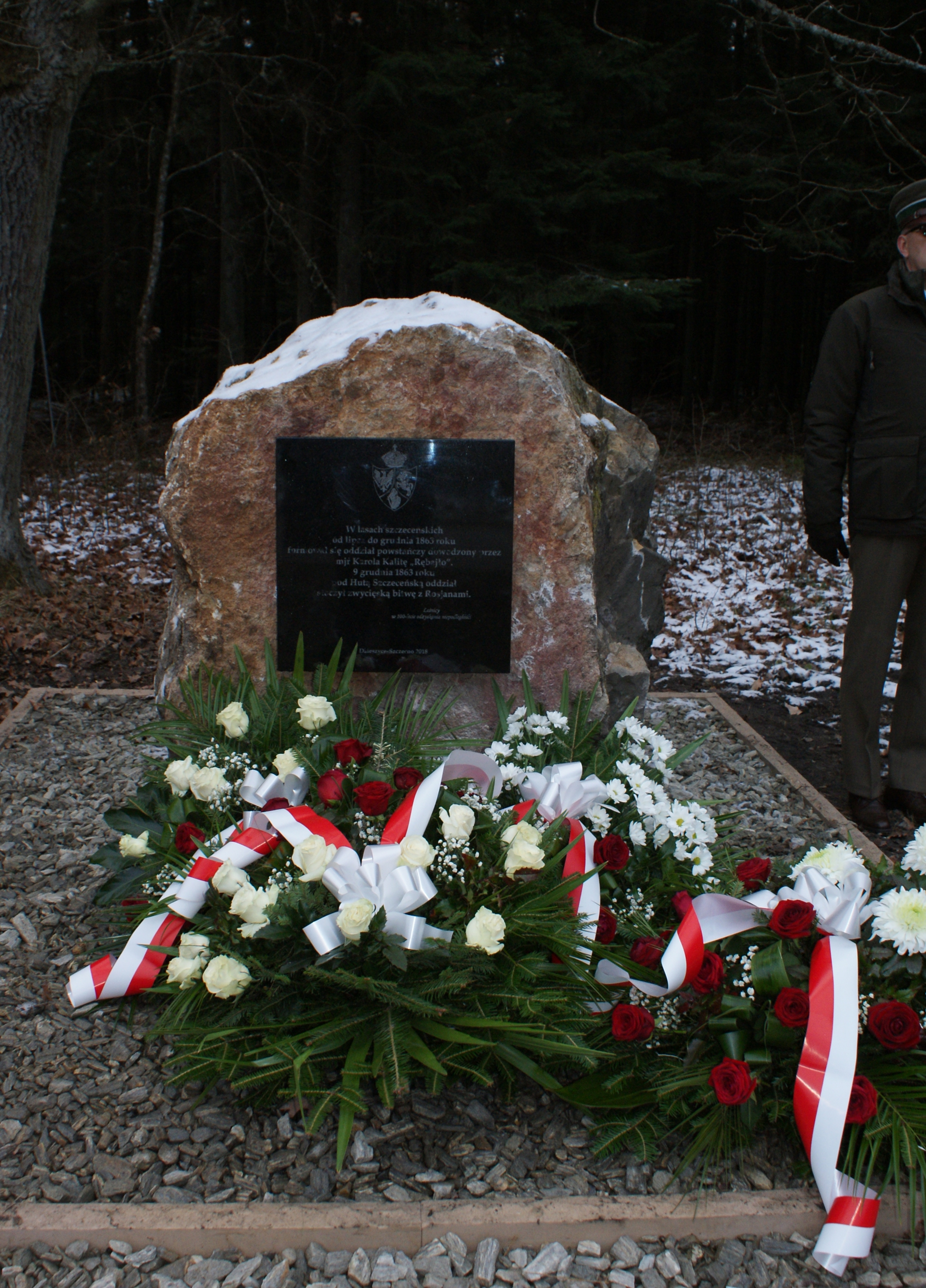 Obelisk odsłonięty 22.11.2018 r. w 155 rocznicę bitwy.